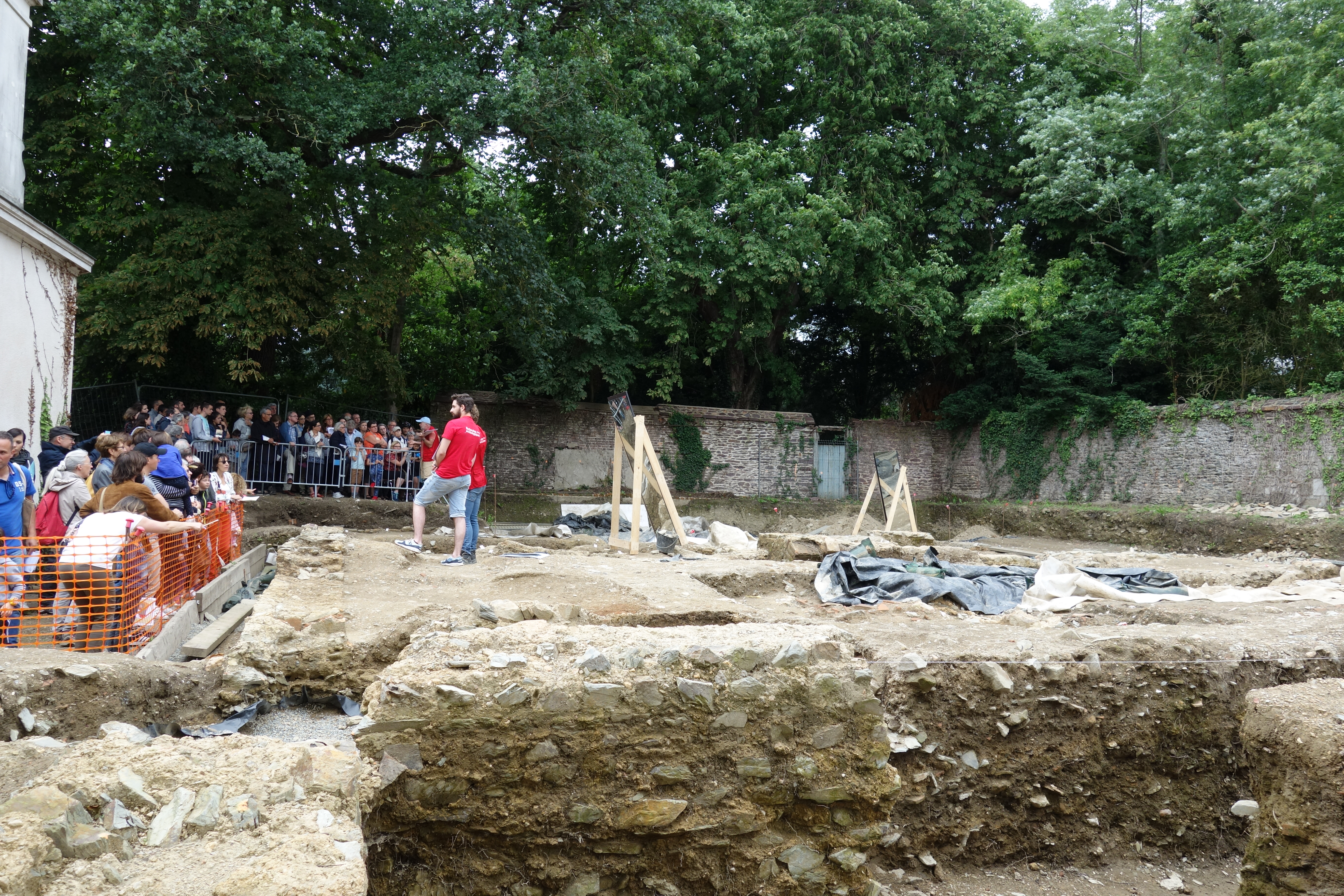 Chantier de fouilles archéologiques de l'INRAP ouvert pendant les Journées nationales de l'archéologie 2018. Public devant les fouilles, avec du personnel de l'INRAP.